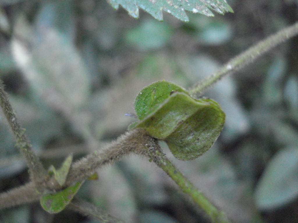 Lamanonia cuneata